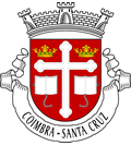 Brasão de Armas de Santa Cruz